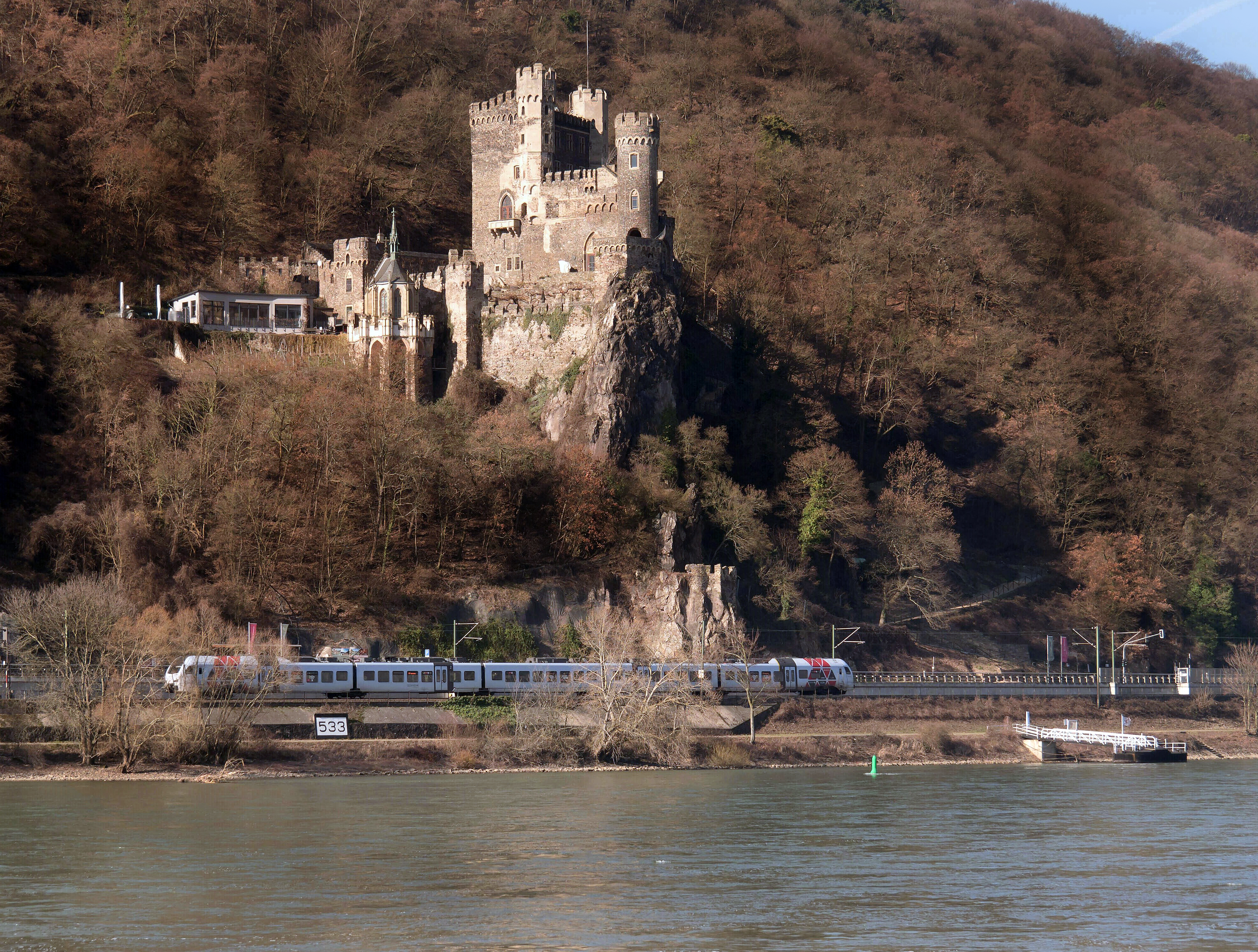 Auf senkrecht zum Rhein abfallendem Felsen über Straße und Bahnlinie steht Burg Rheinstein.